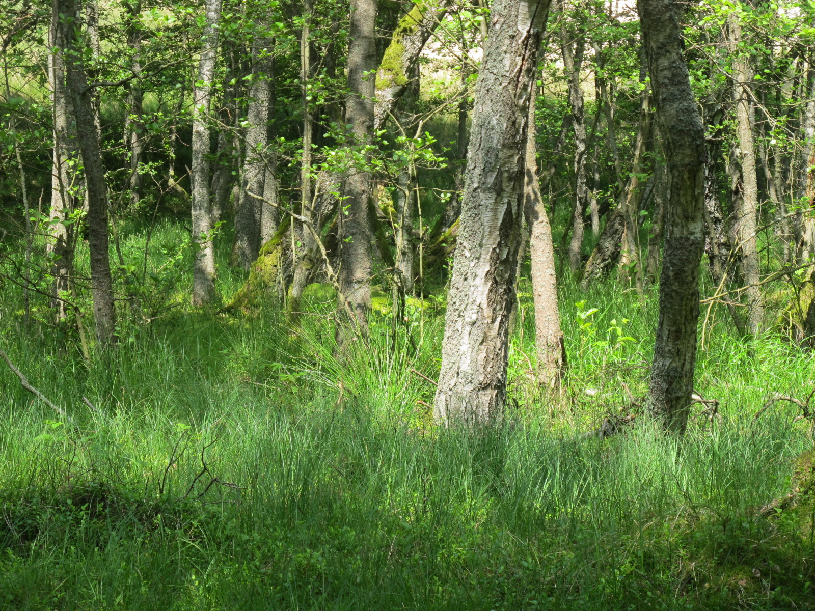 Im Słowiński National Park, Polen 6'2013